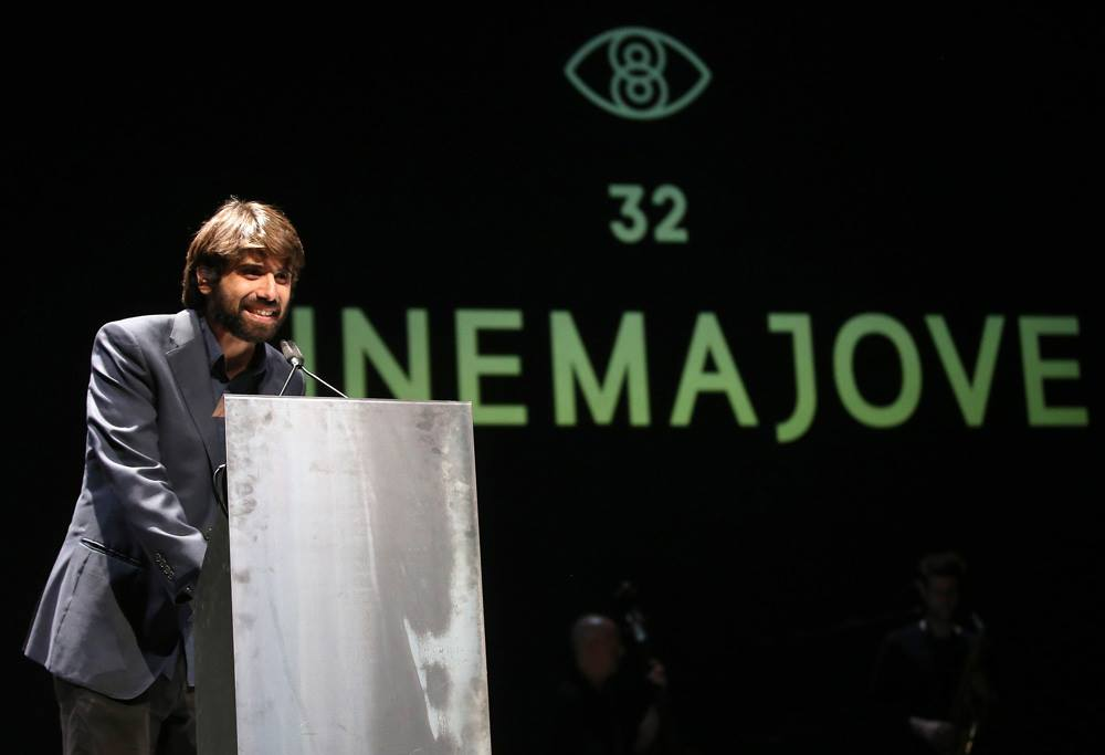 Cralos Madrid à la tribune Cinema Jove